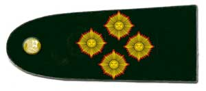 insignia de General de Ejercito del Ejercito del Peru